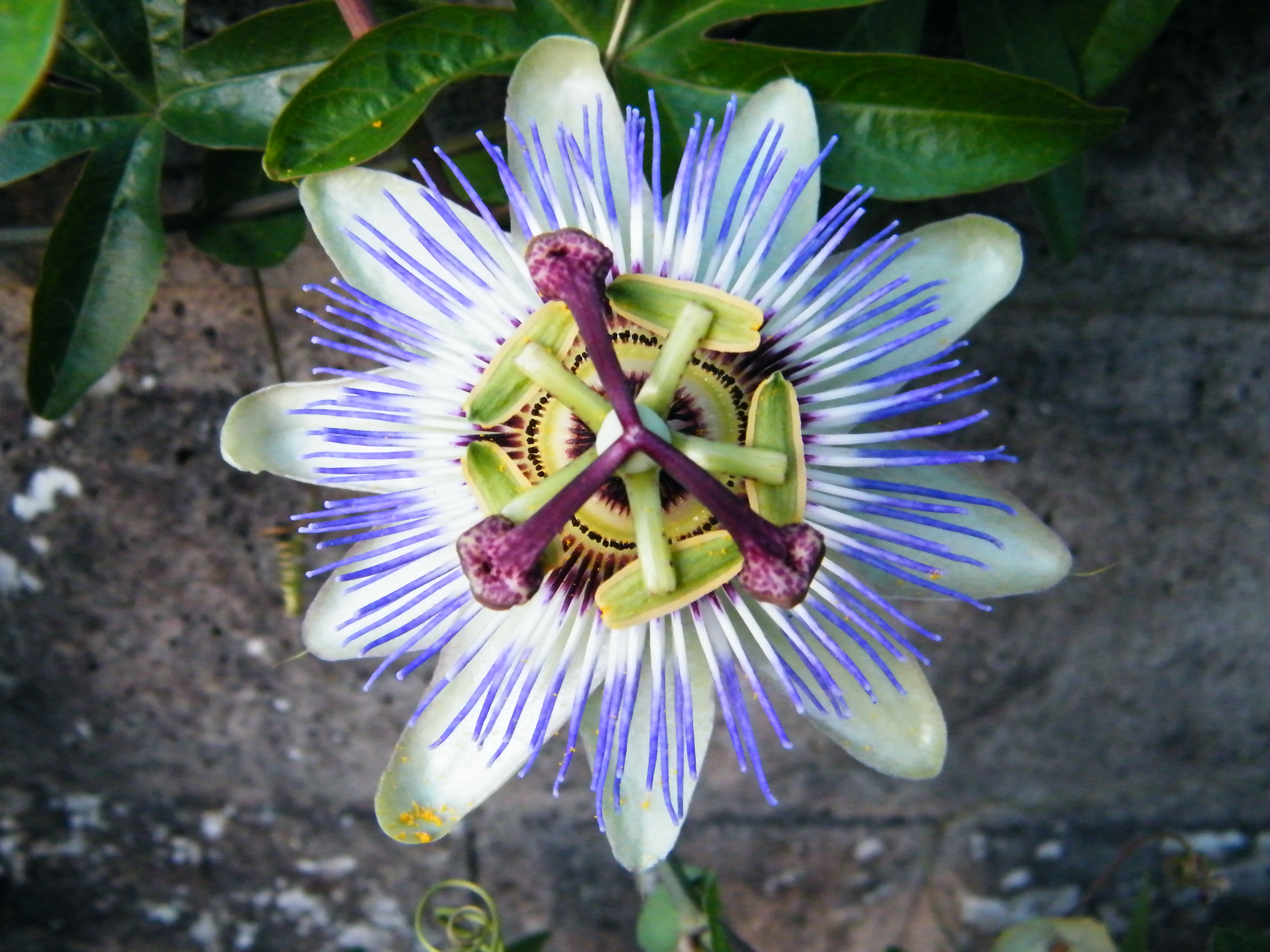 Passiflore